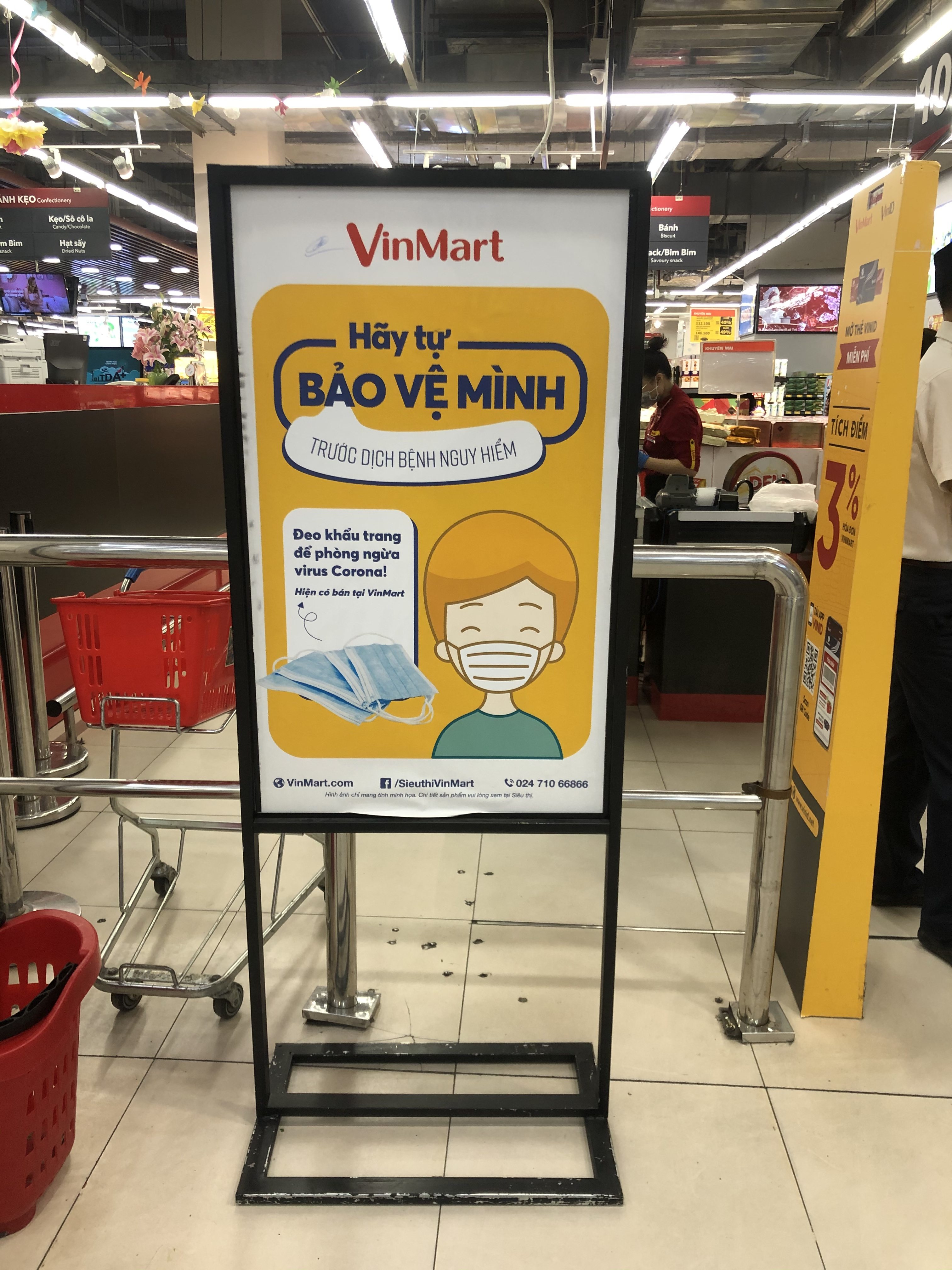 Biển cảnh báo đại dịch COVID-19 trước cửa VinMart